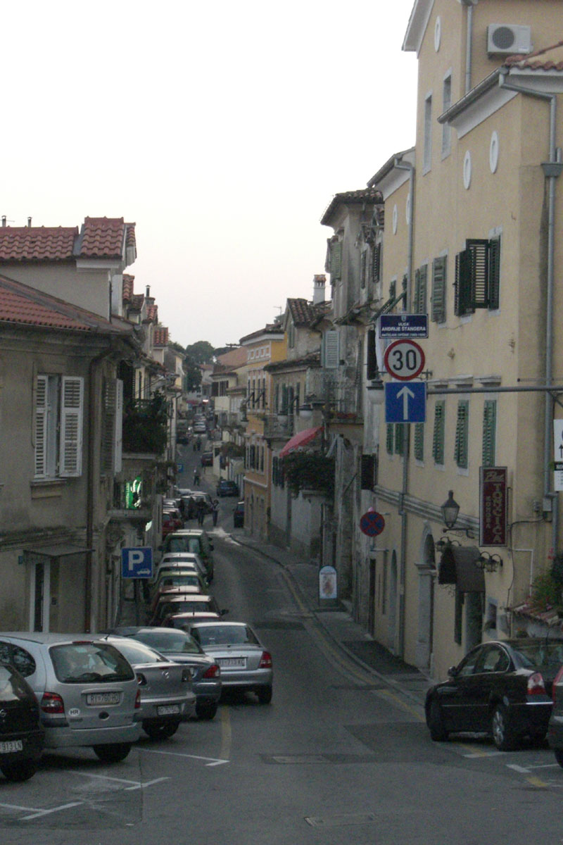 Volosko, Croatia.